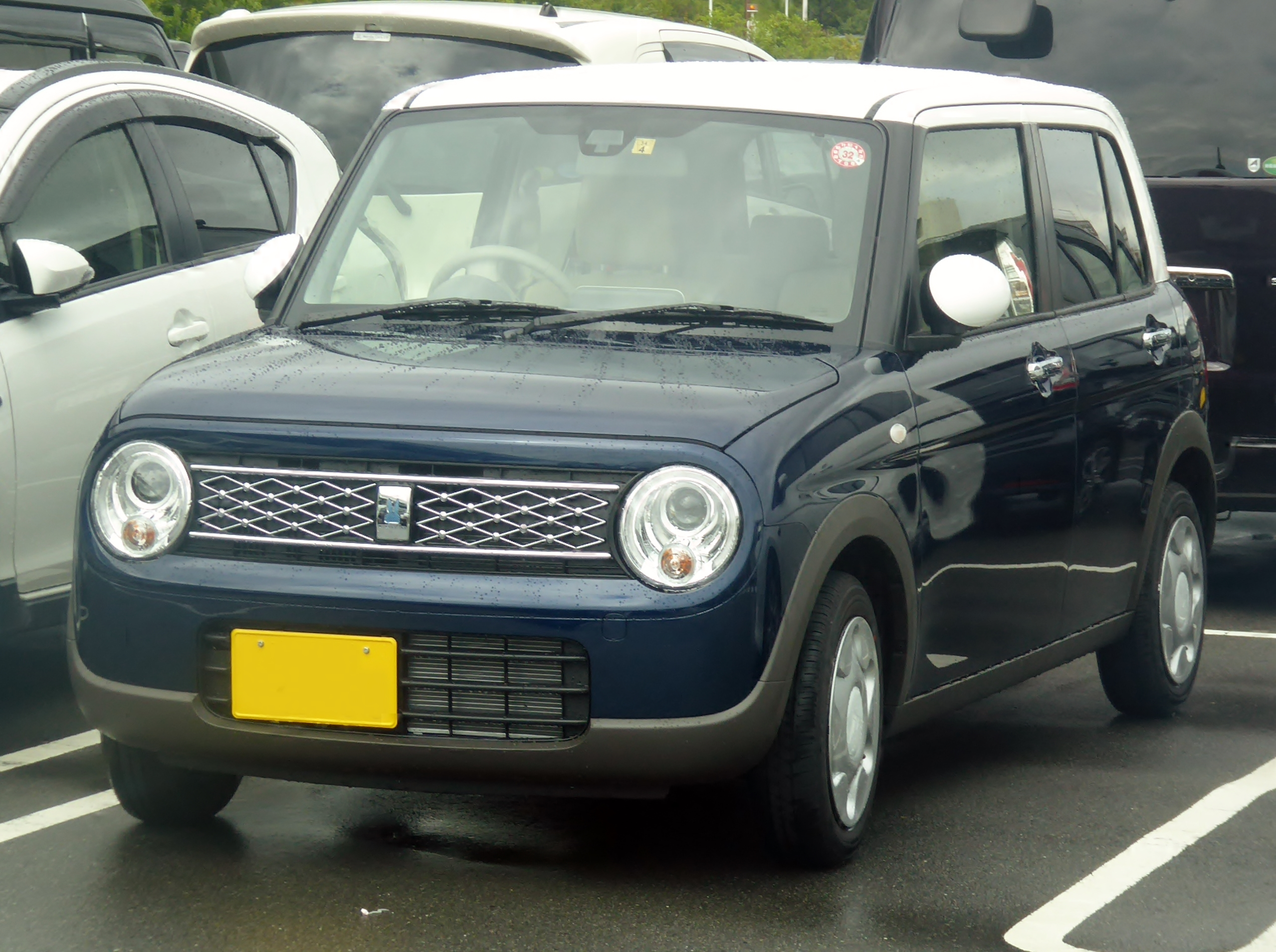 DBA-HE33S-NBSE-S2型スズキ・アルトラパンMODEをフロントから撮影。